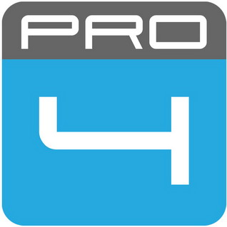 Logo von PRO4